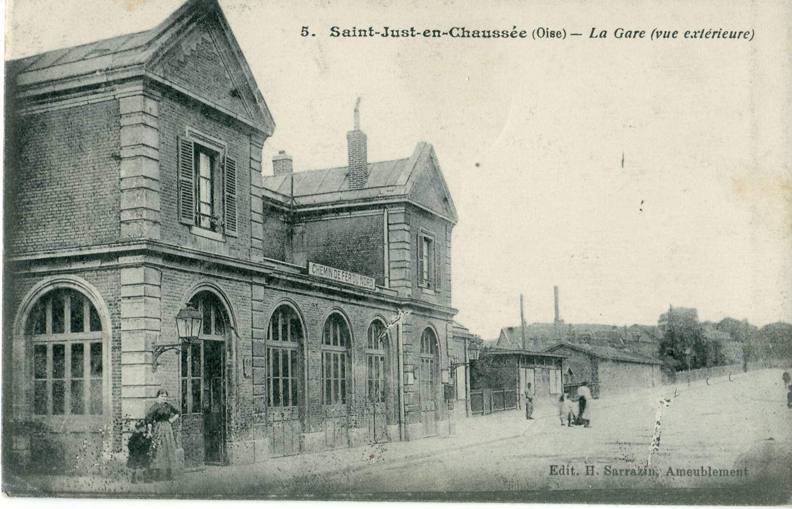 Carte postale ancienne éditée par Sarrazin, N°5 SAINT-JUST EN CHAUSSEE - La Gare (vue extérieure)